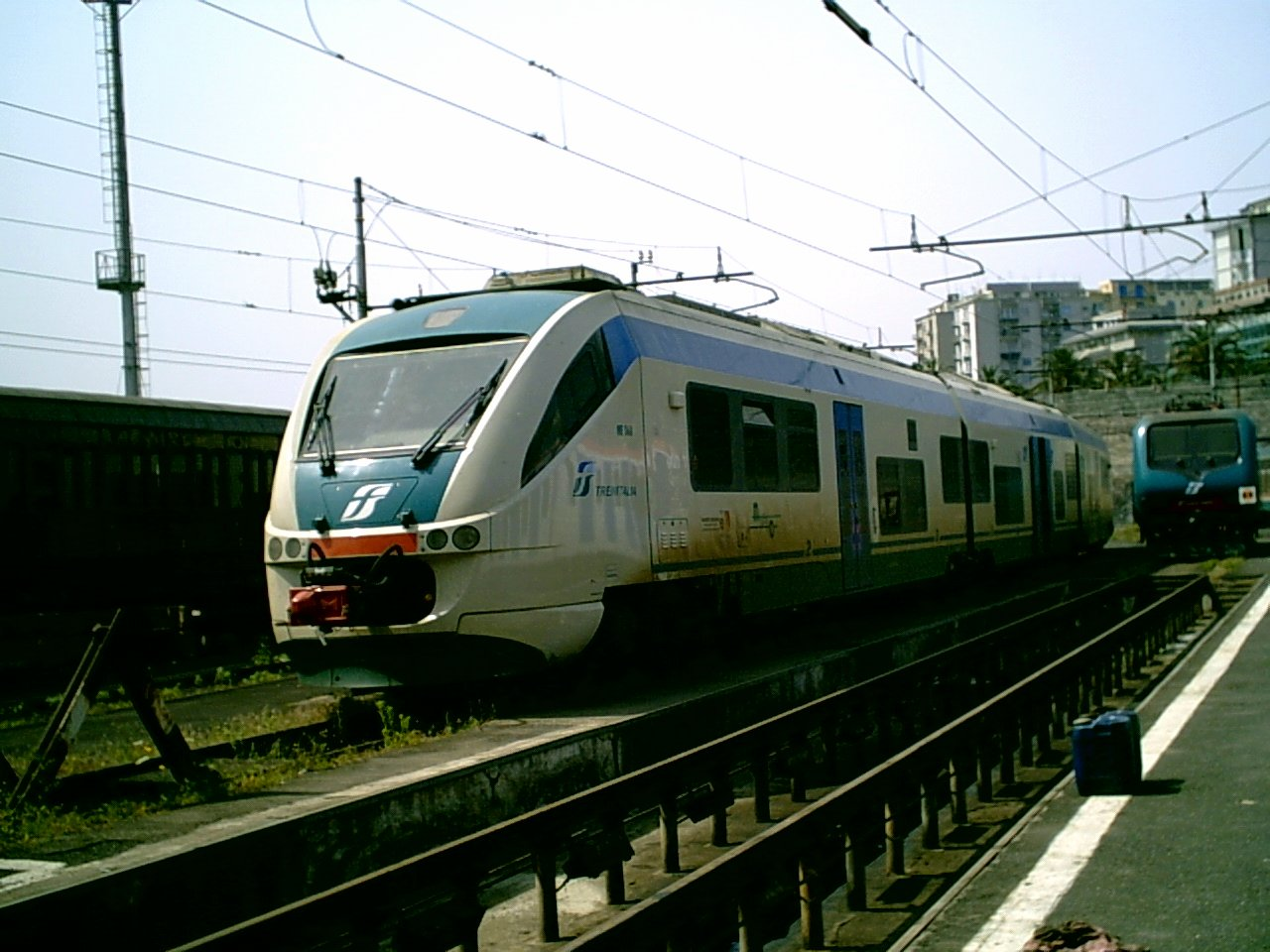 Foto di un treno